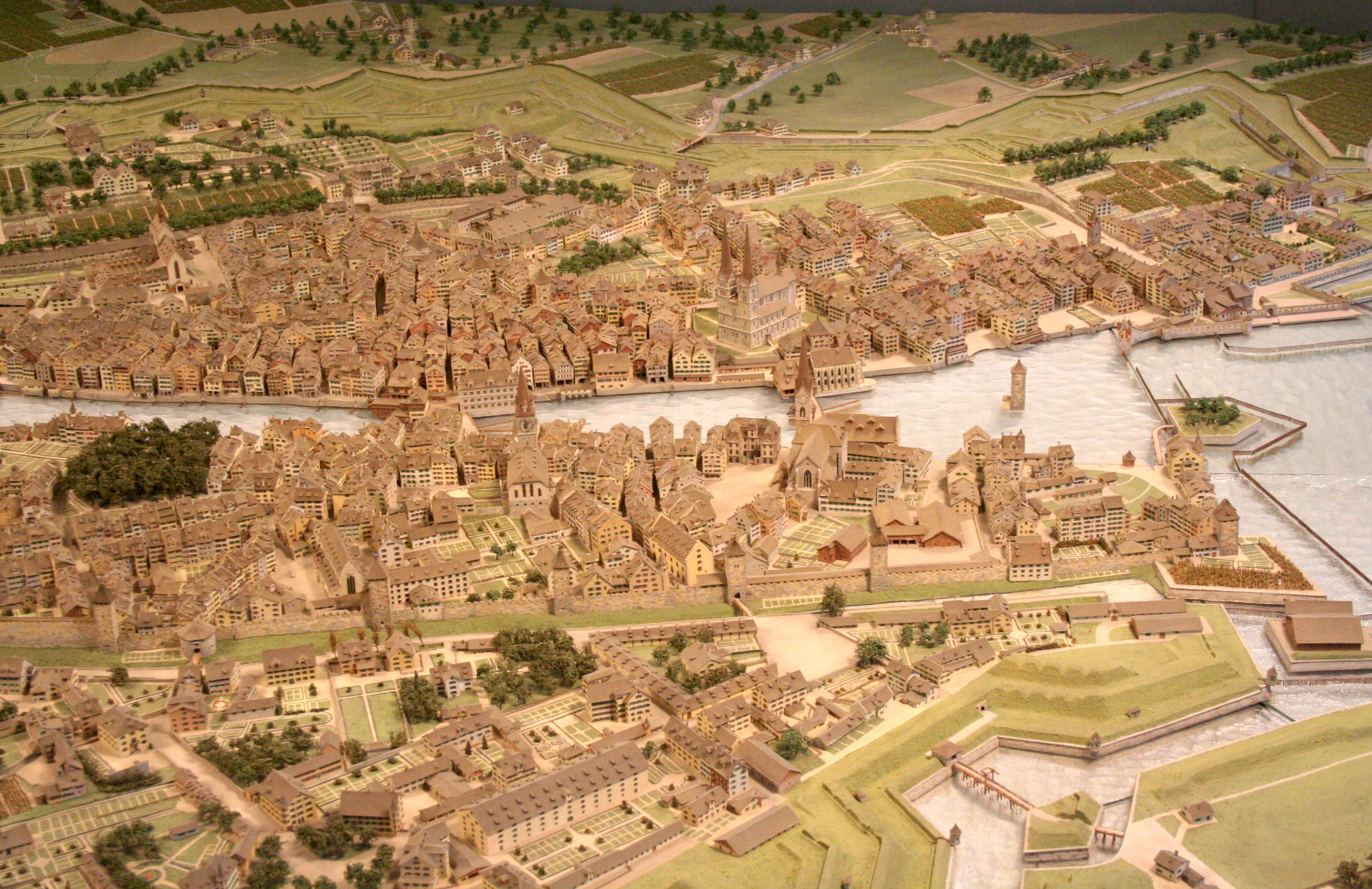 Stadtmodell Zürichs von Hans Langmack nach der Vorlage des Müllerplans